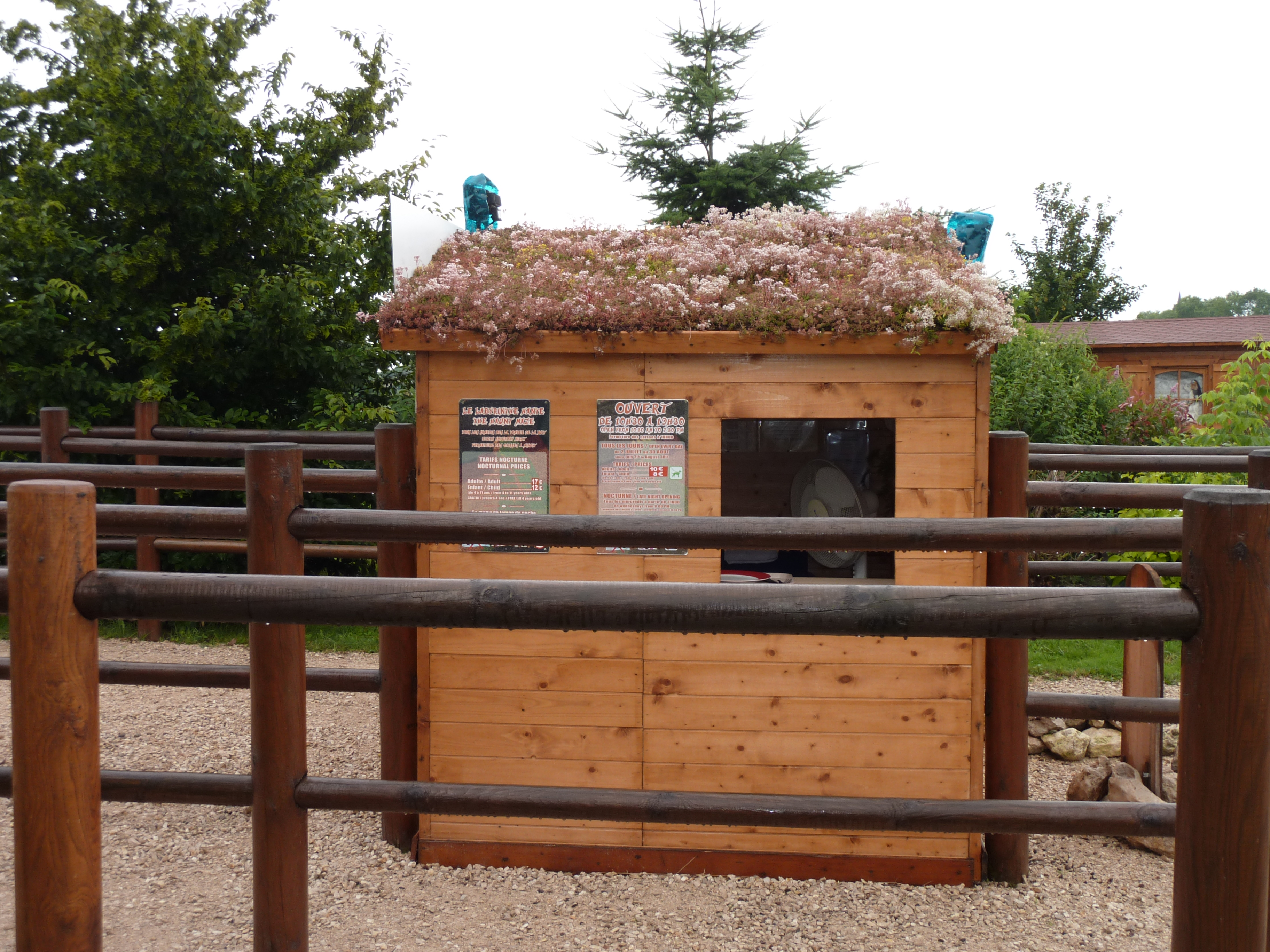 billeterie